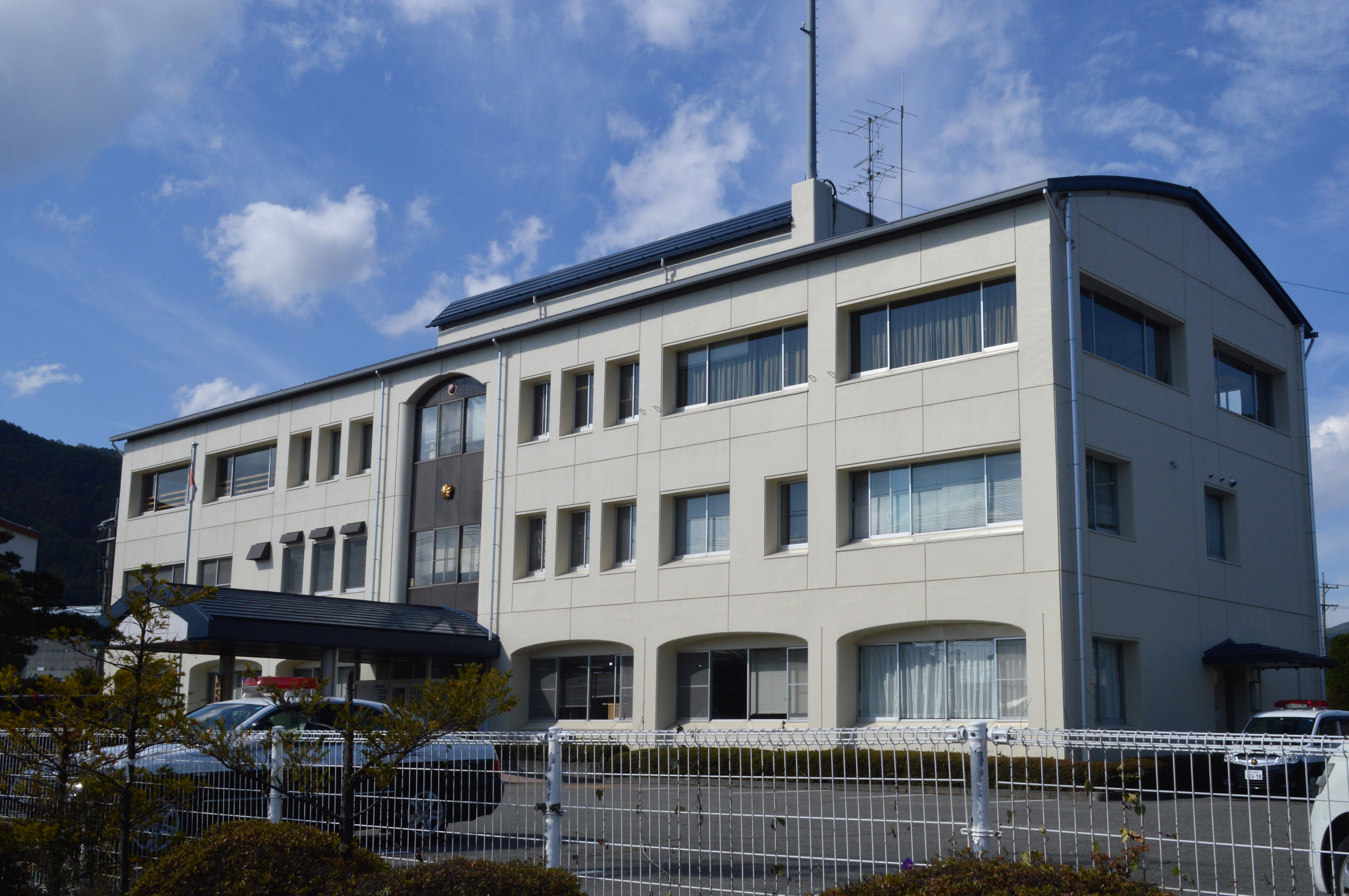 長野県上伊那郡辰野町にある伊那警察署辰野警部交番。